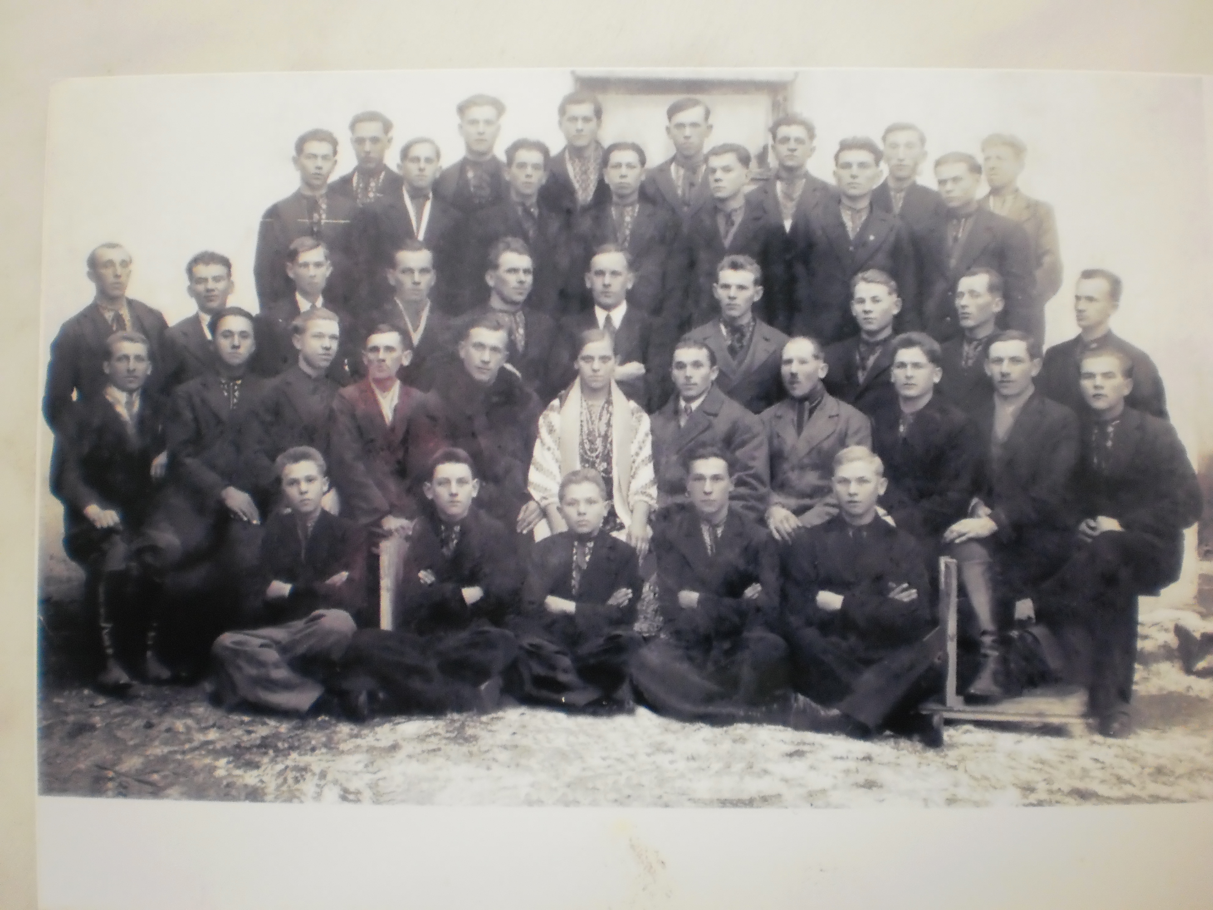 Фото № 13. Гурток ,"Хліборобска молодь’" і спортивне товариство "Сокіл"'. Старе Село.1934 рік.